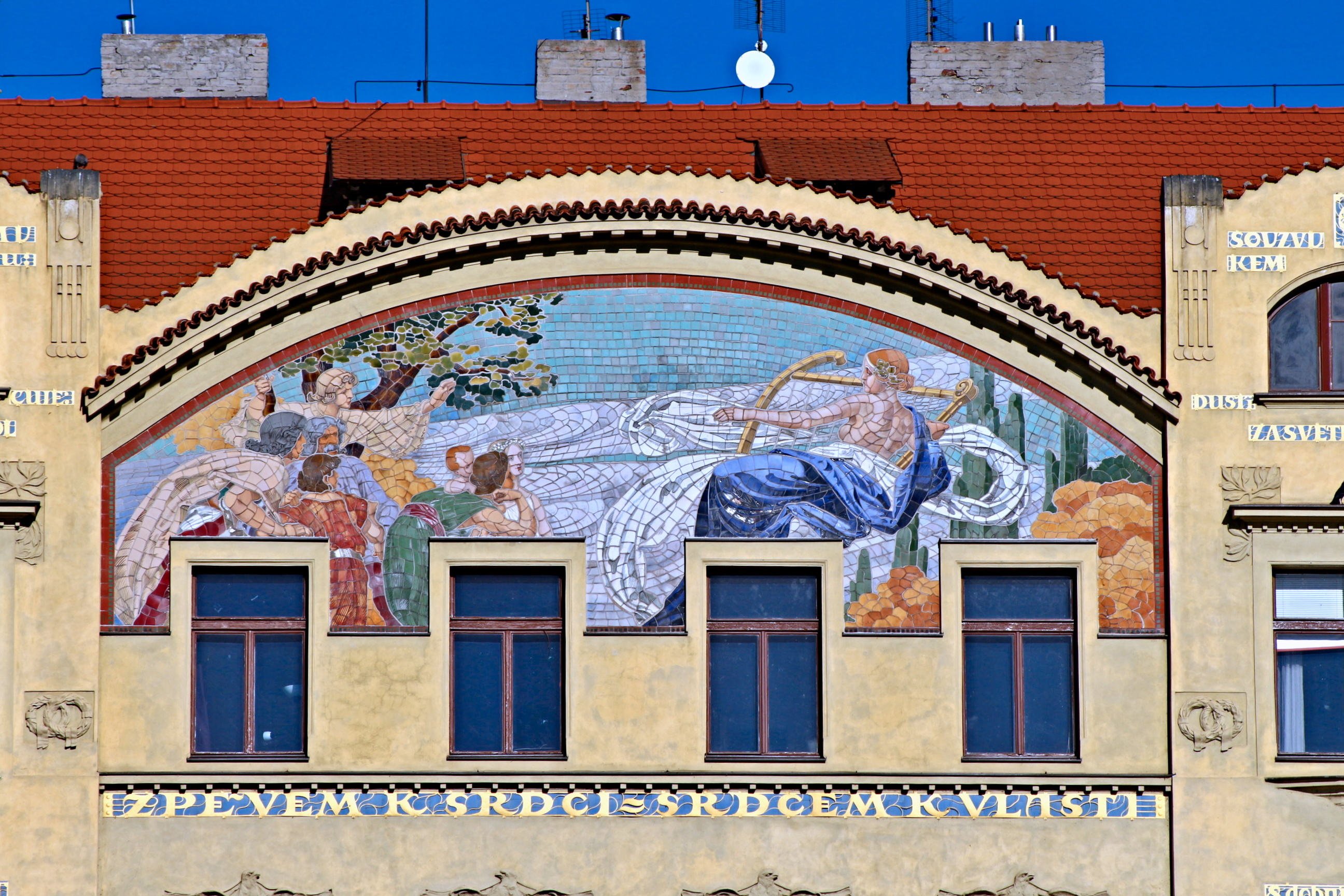 Praha, budova Hlahola